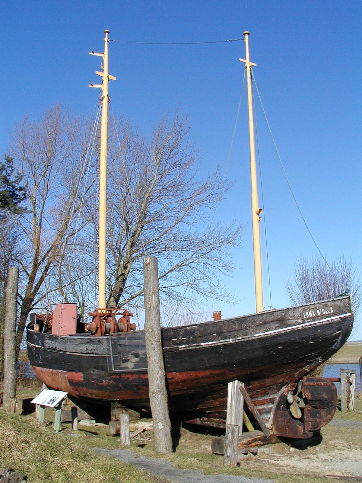 Der Fischkutter Erna Becker